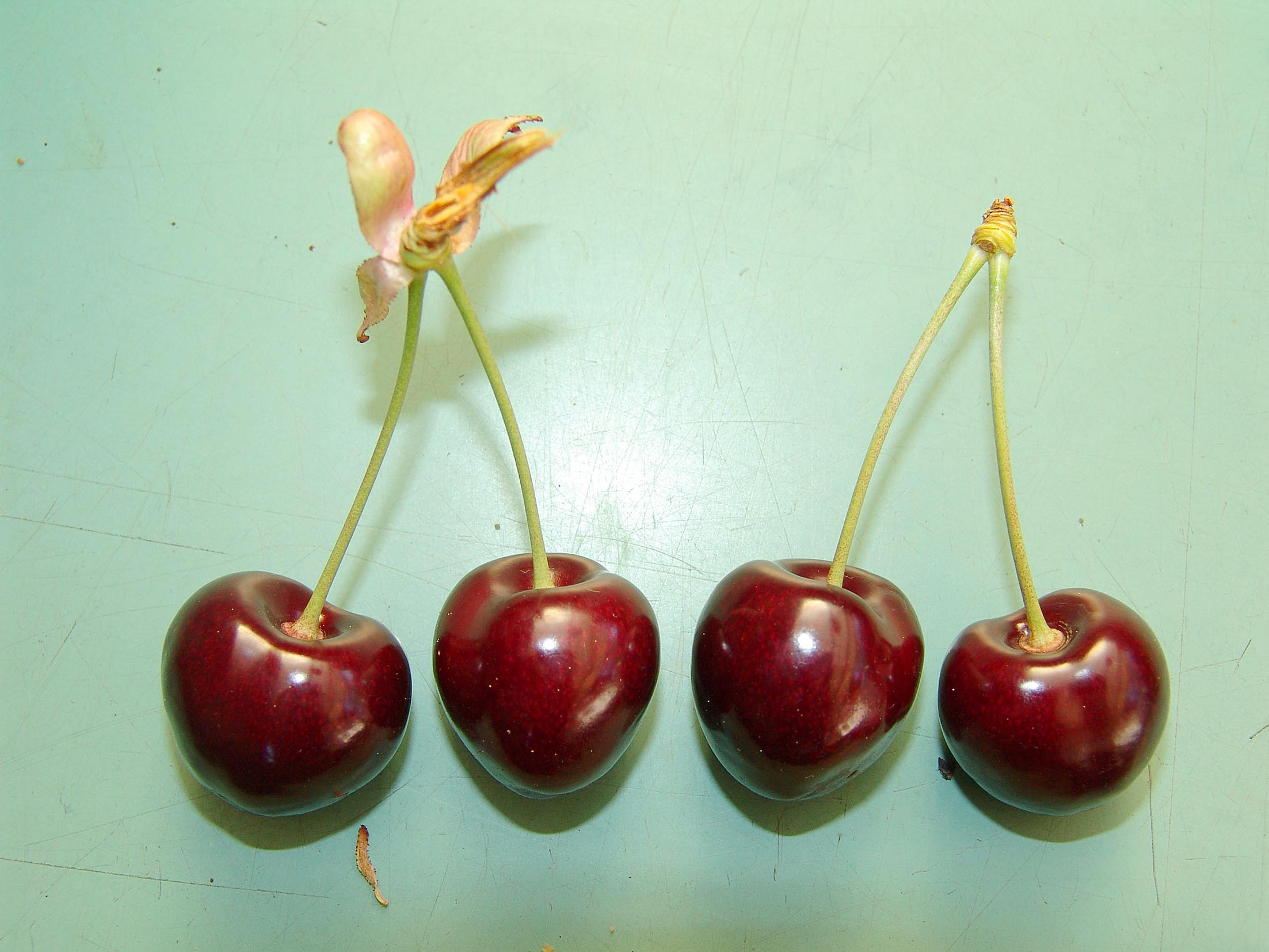 Zuger Chriesi geniessen schweizweit einen hervorragenden Ruf.